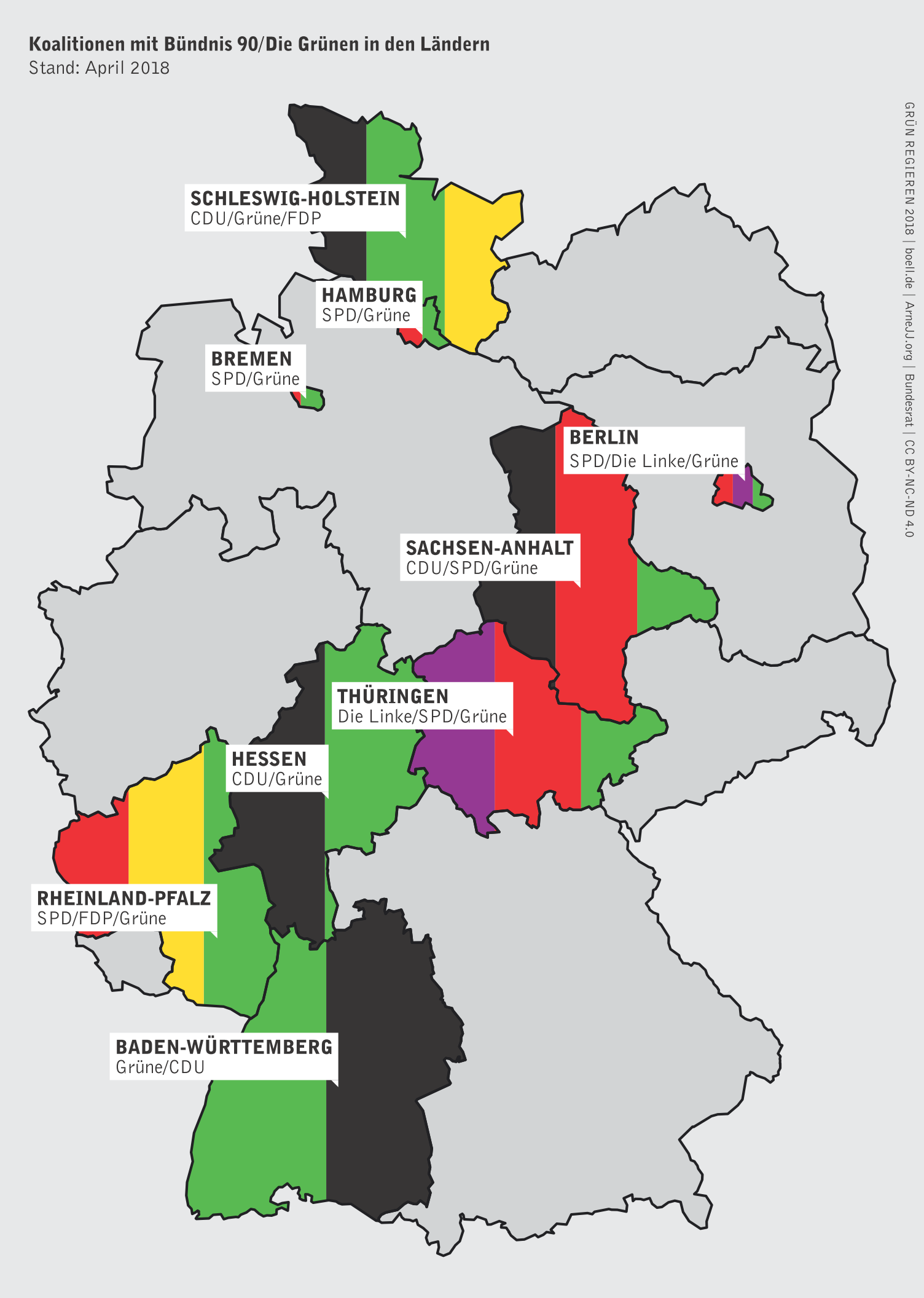 Die jeweiligen Koaltionen mit grüner Beteiligungen werden farblich dargestellt. Alle Bundesländer die zum Stand der Grafik nicht von Bündnis'90/Die Grünen mitregiert wurden, werden grau dargestellt.